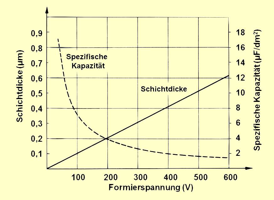 Zusammenhang zwischen Formierspannung und Dicke der Oxidschicht (Dielektrikum) bei Aluminium-Elektrolytkondensatoren